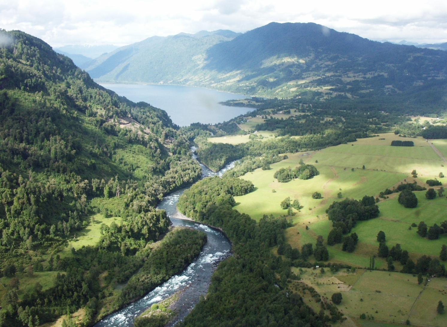 Río Llanquihue (confluencia Neltume y Fuy)